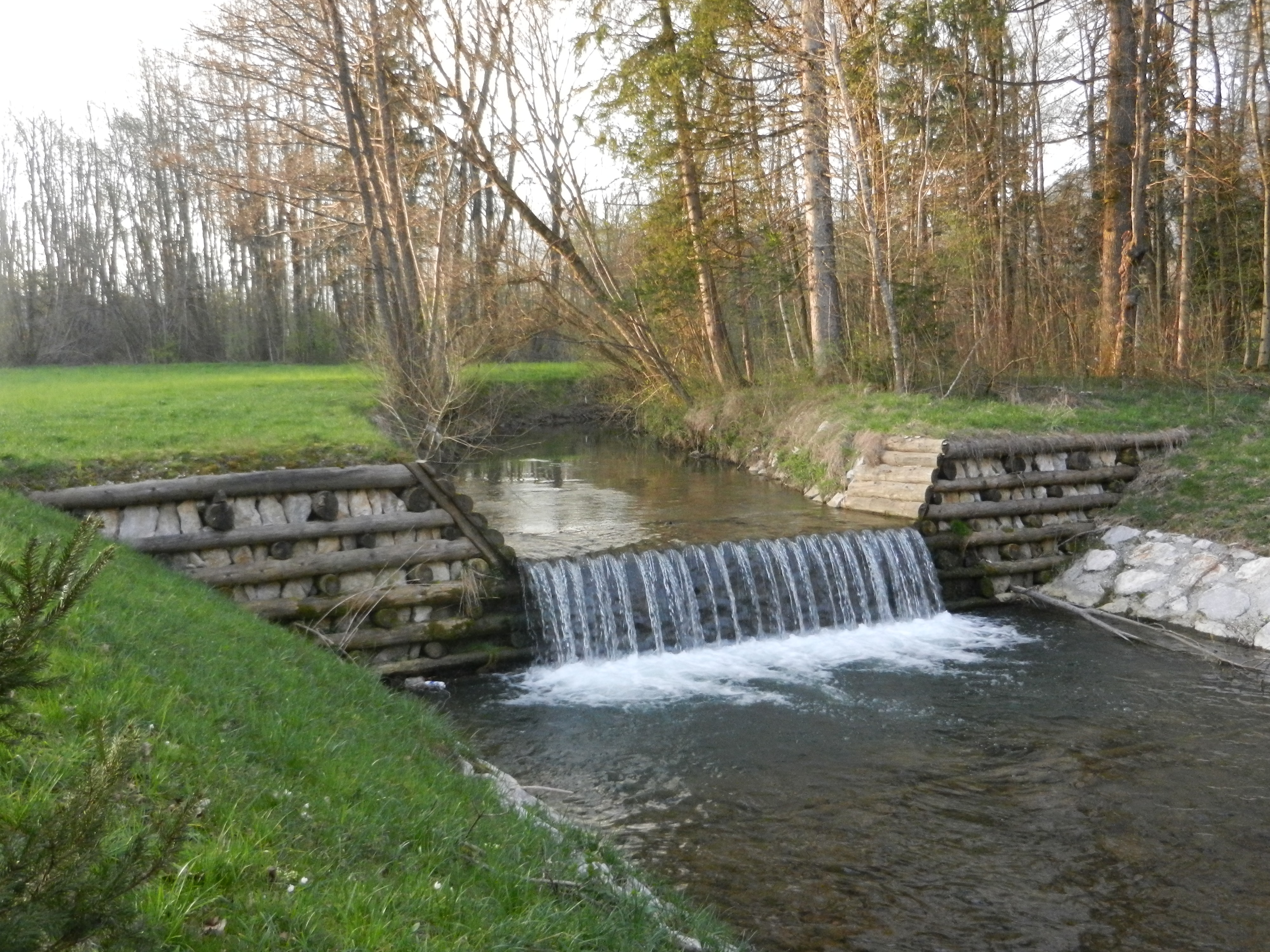 Kranjska stena na Pšati v Zalogu pri Cerkljah, Slovenija.